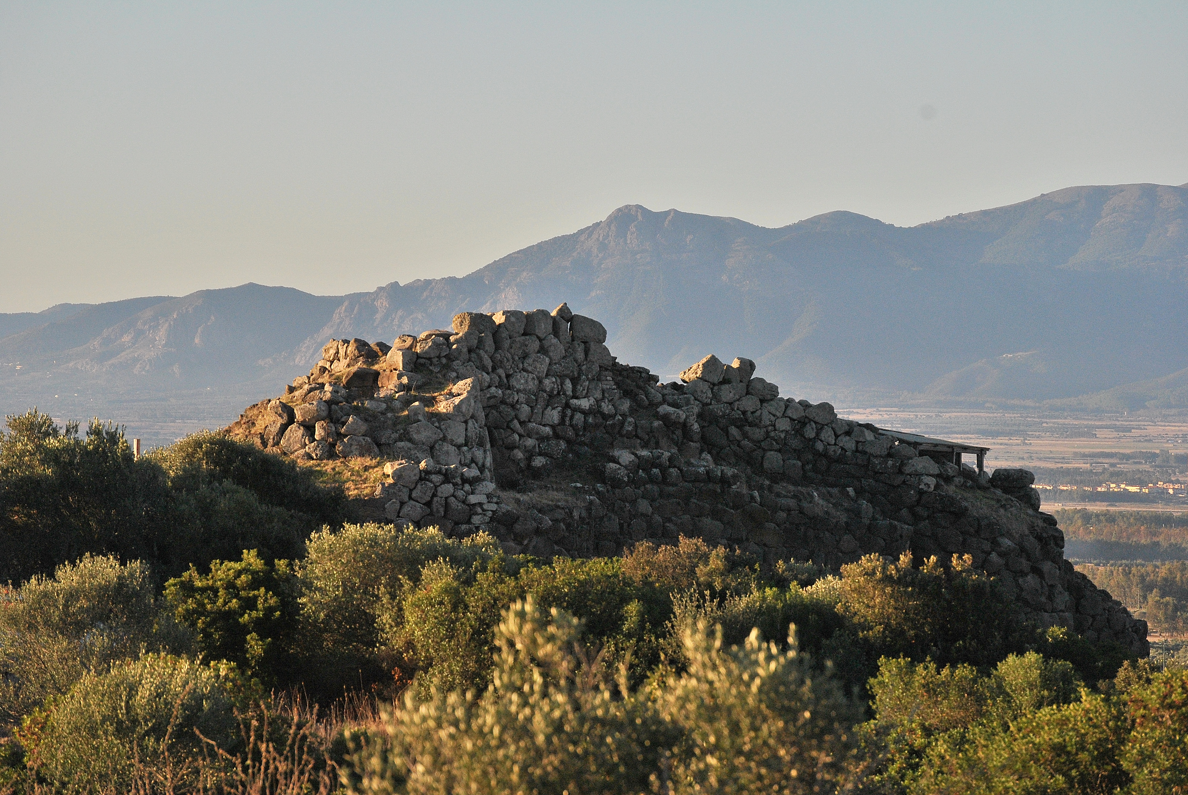 Area archeologica Tharros This is a photo of a monument which is part of cultural heritage of Italy.